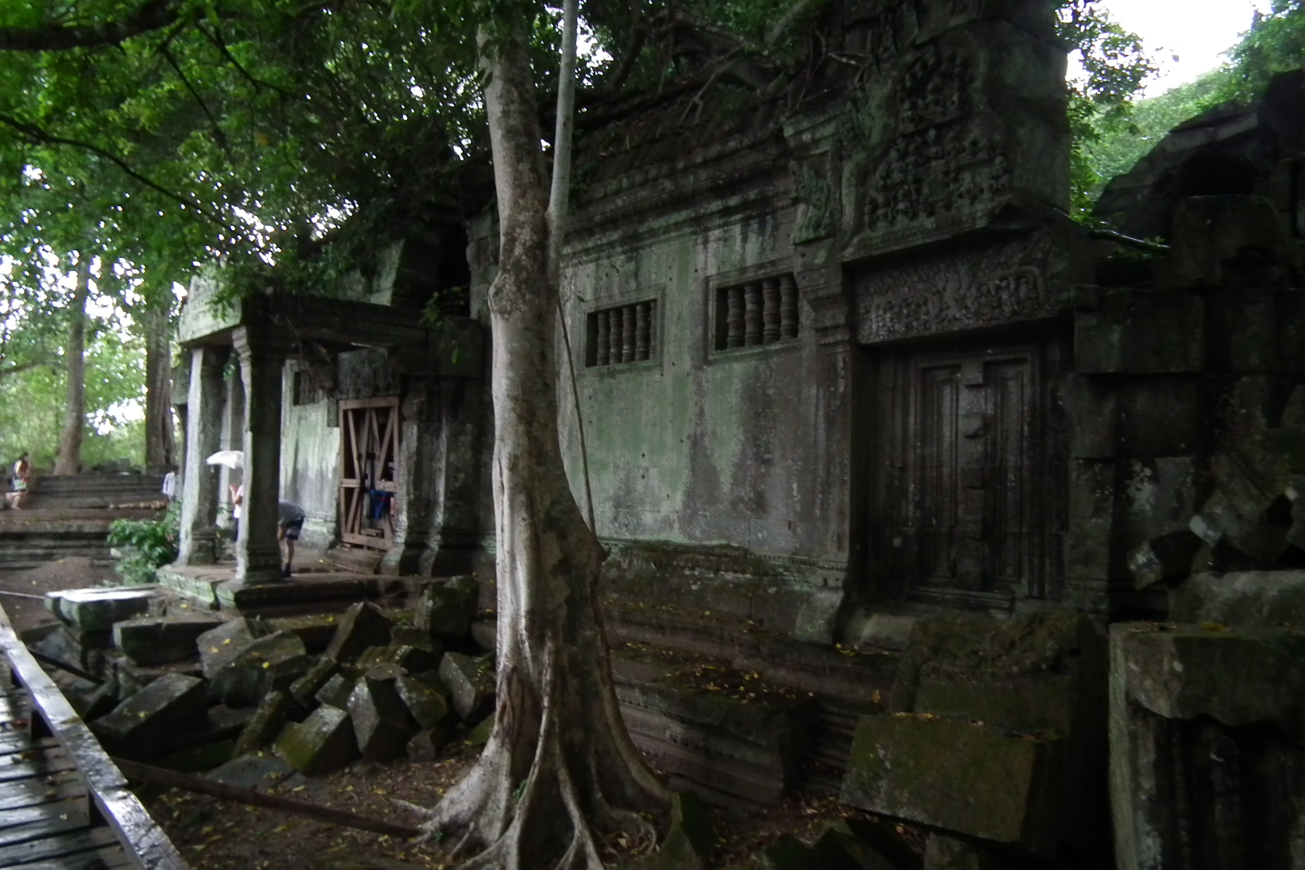 Beng Mealea ប្រាសាទបឹងមាលា ベンメリア アンコール遺跡群